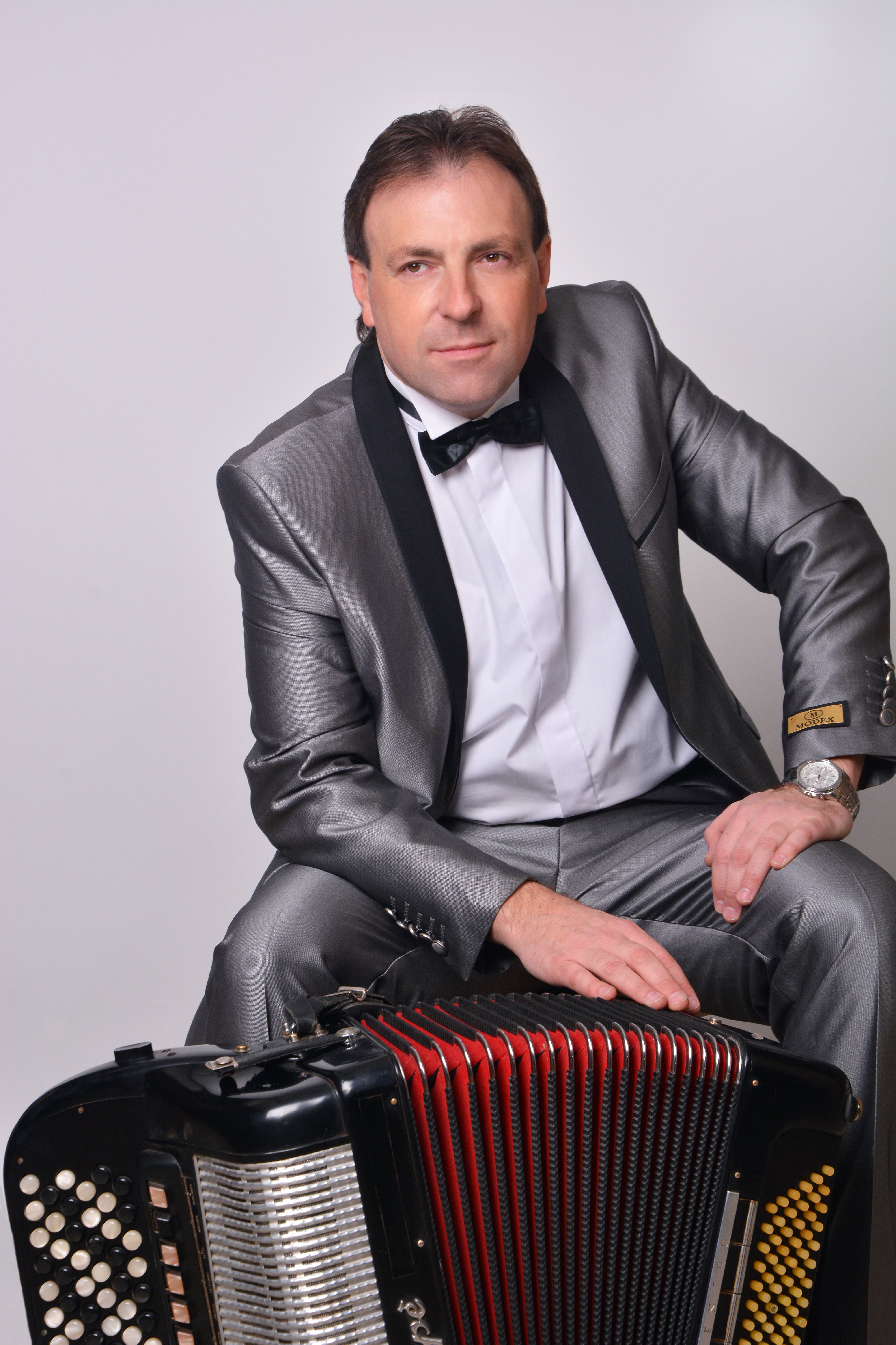 Boban Stanković (Prokuplje, 1975) srpski je istaknuti estradni umetnik-instrumentalista.